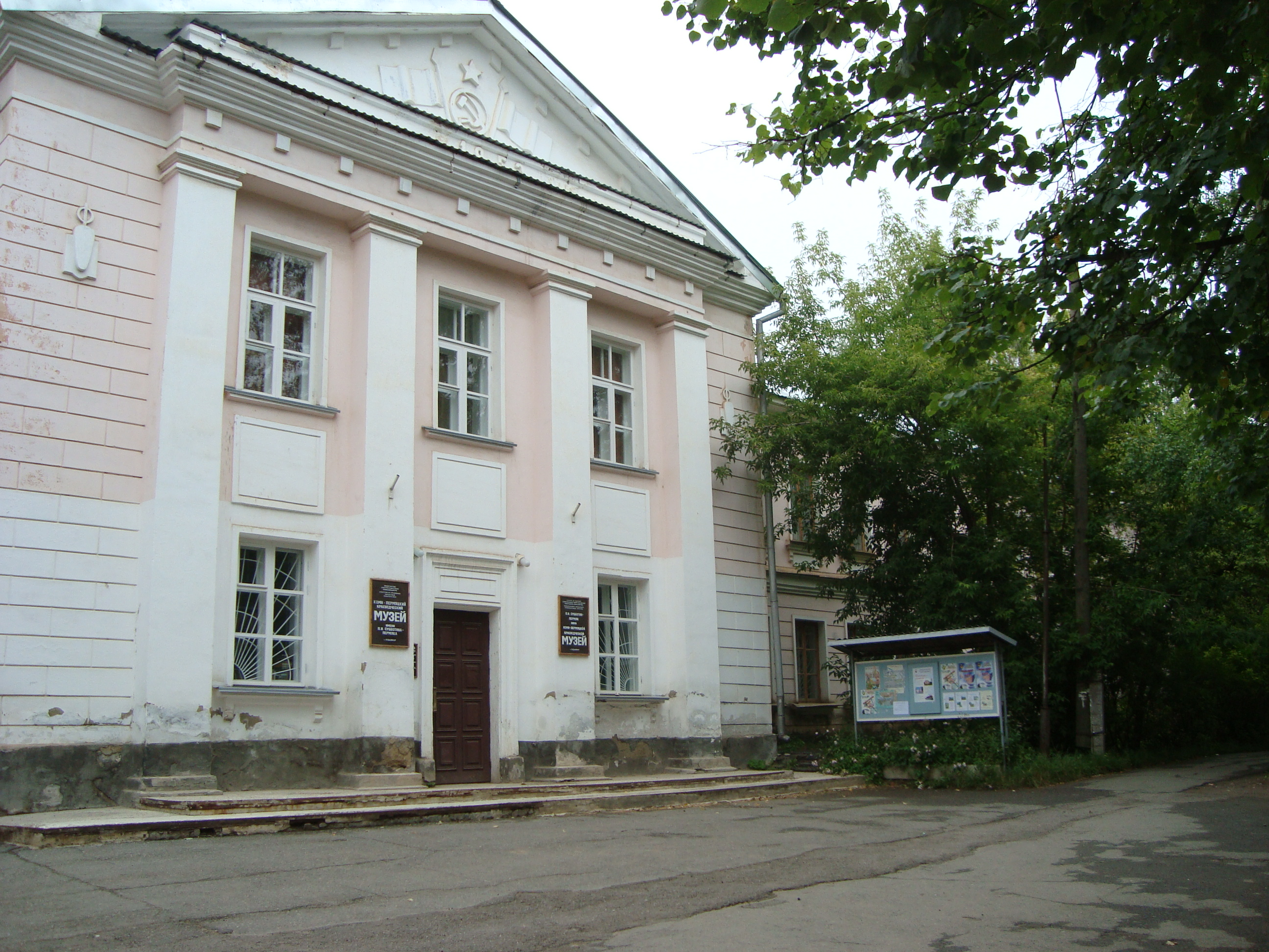 Коми: Перым коми музей Кудымкарын